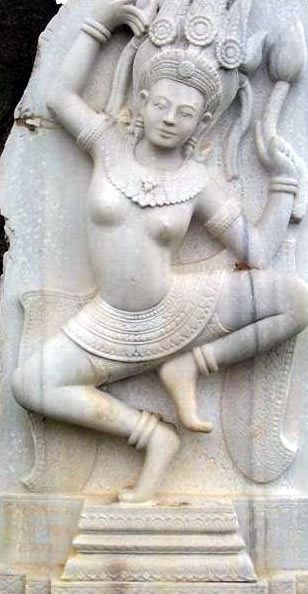 Vietnam'da Hindu Champa krallığından kalma antik Apsara heykeli.